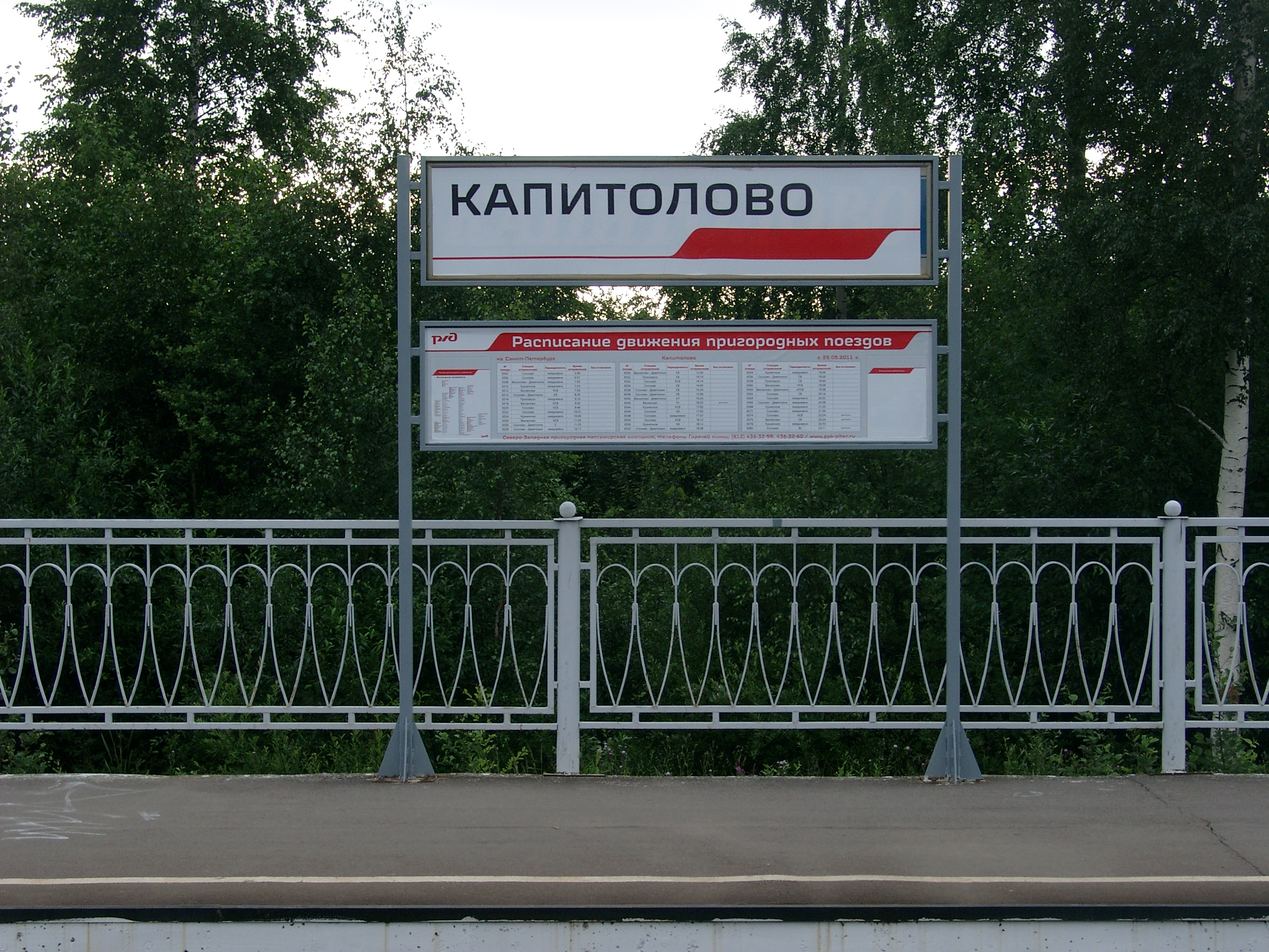 Станция Капитолово. Новый указатель с названием на платформе. 2011 г.